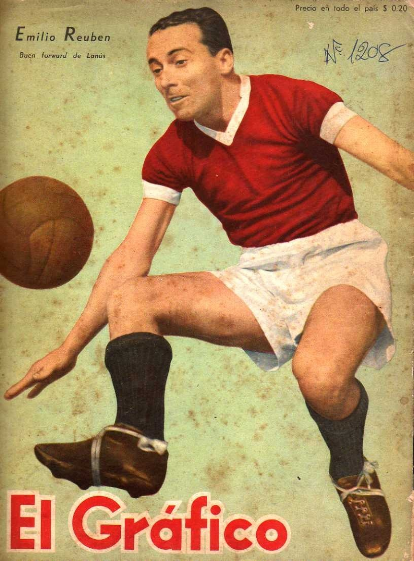 Emilio Reuben, jugador de Lanús. Portada de Revista El Gráfico N° 1208 - Año 1942.